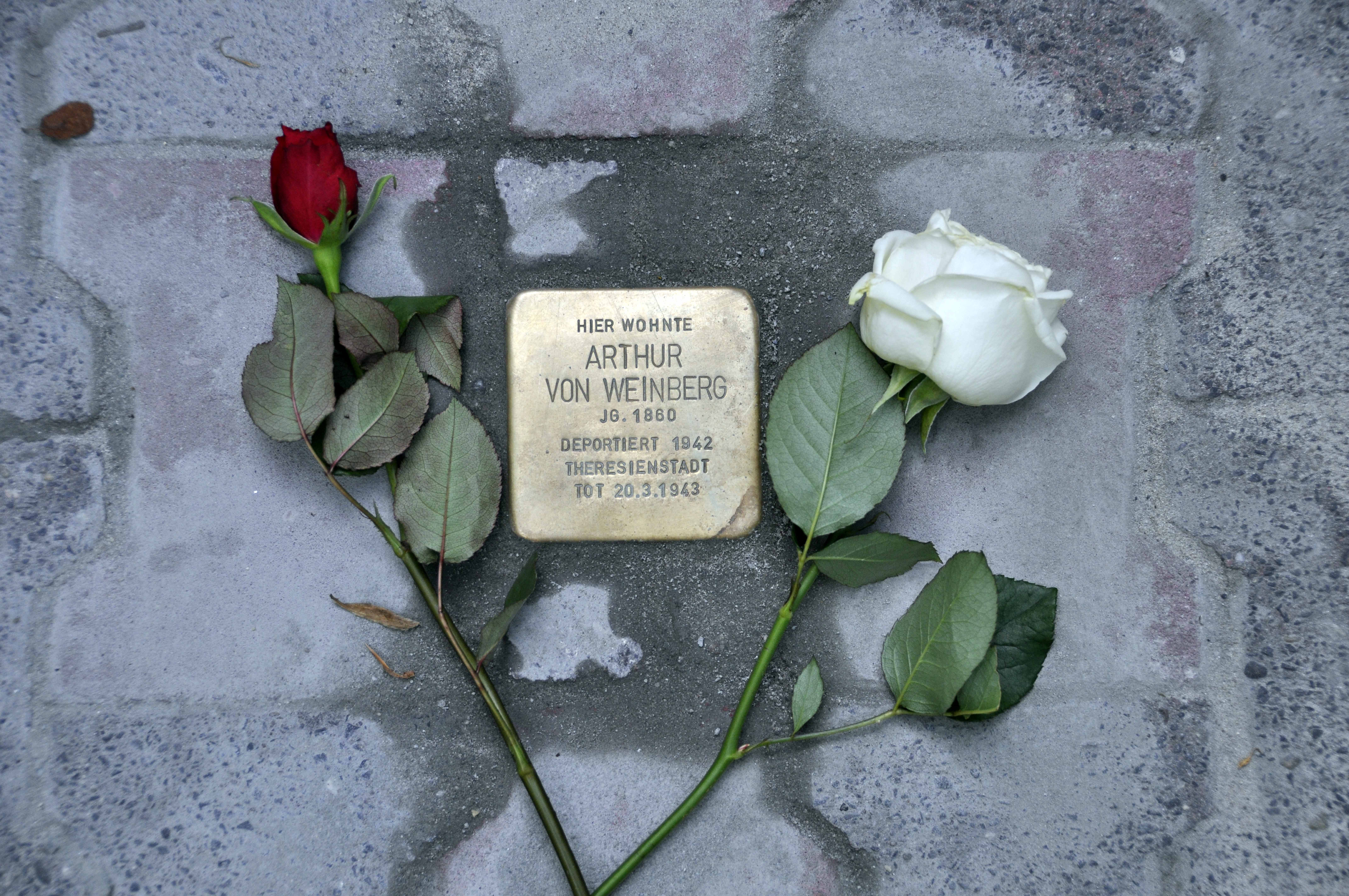 Stolpersteine Villa Buchenode, Buchenrodestraße Arthur von Weinberg